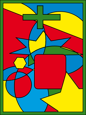 四色定理の彩色事例